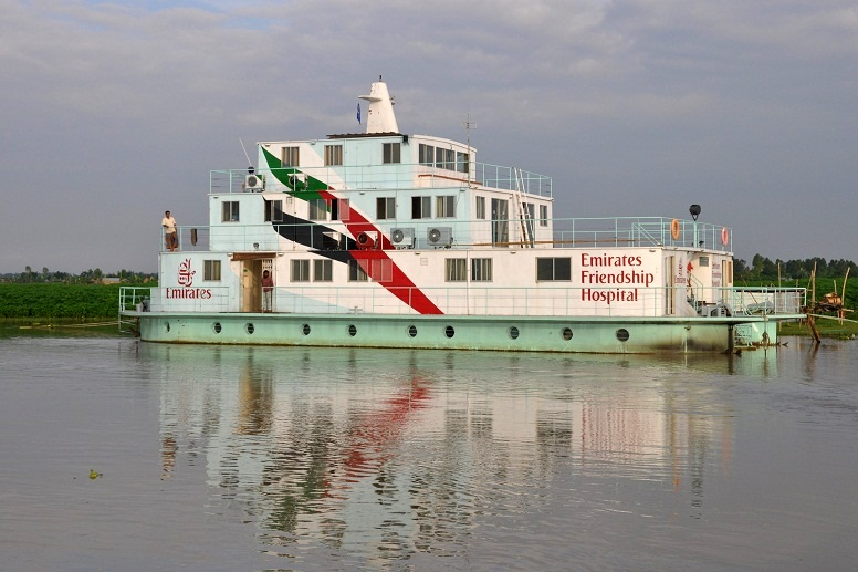 Ce catamaran est le premier bateau du chantier naval TaraTari